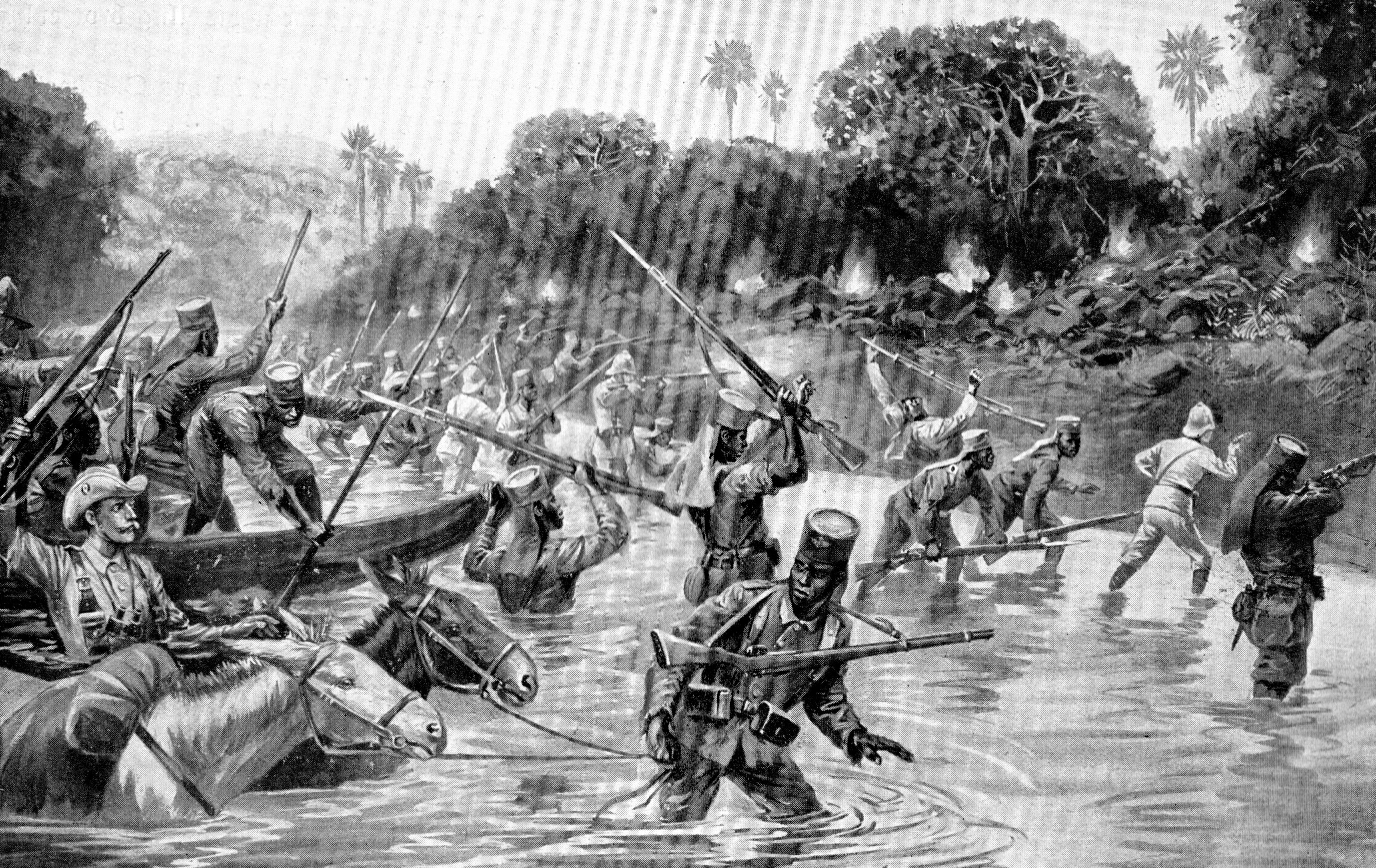 Der Durchbruch der Schutztruppe Deutsch-Ostafrika über den Rowuma MItte November 1917. Darstellung von Carl Arriens